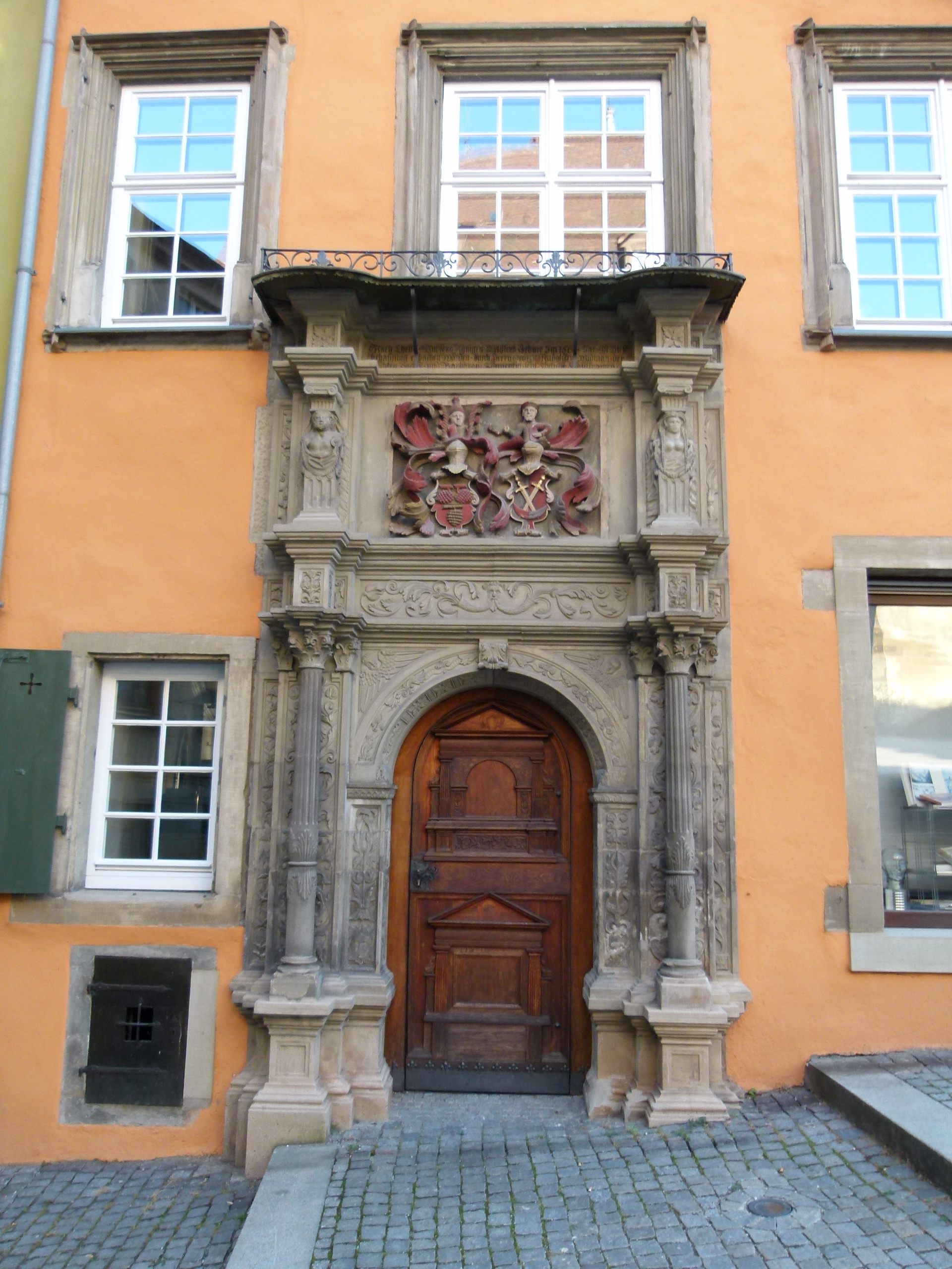 Denkmalgeschütztes Haus, Am Markt 5, Schwäbisch Hall